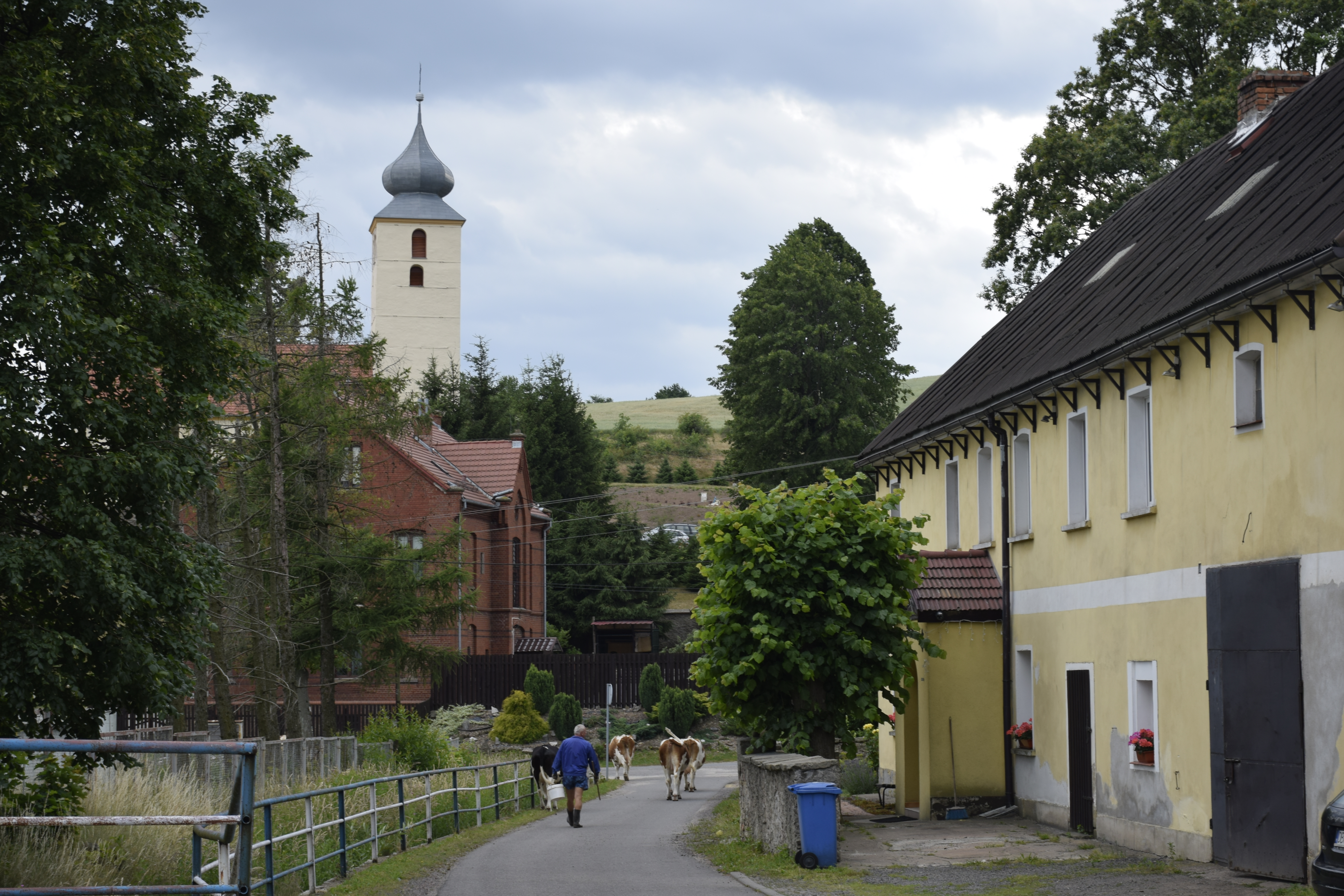 Gostków (województwo dolnośląskie). Polska